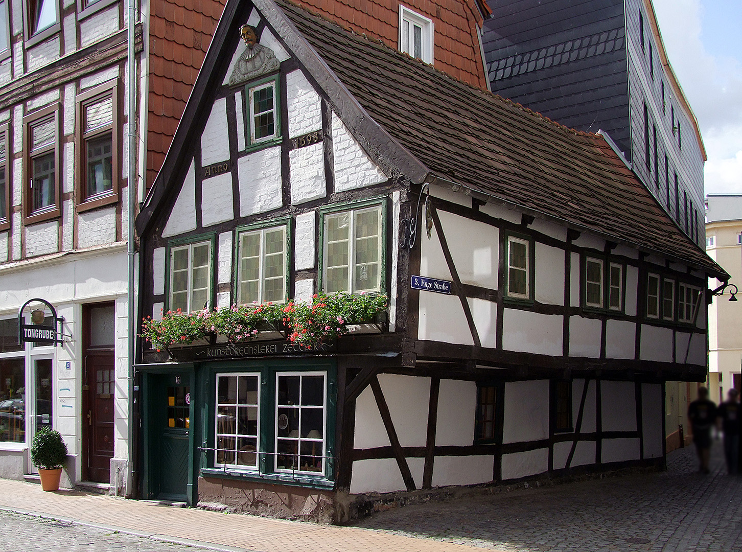 Wer hat dort nicht schon mal etwas gekauft von den schönen Holzartikeln aus der Kunstdrechslerei Zettler?